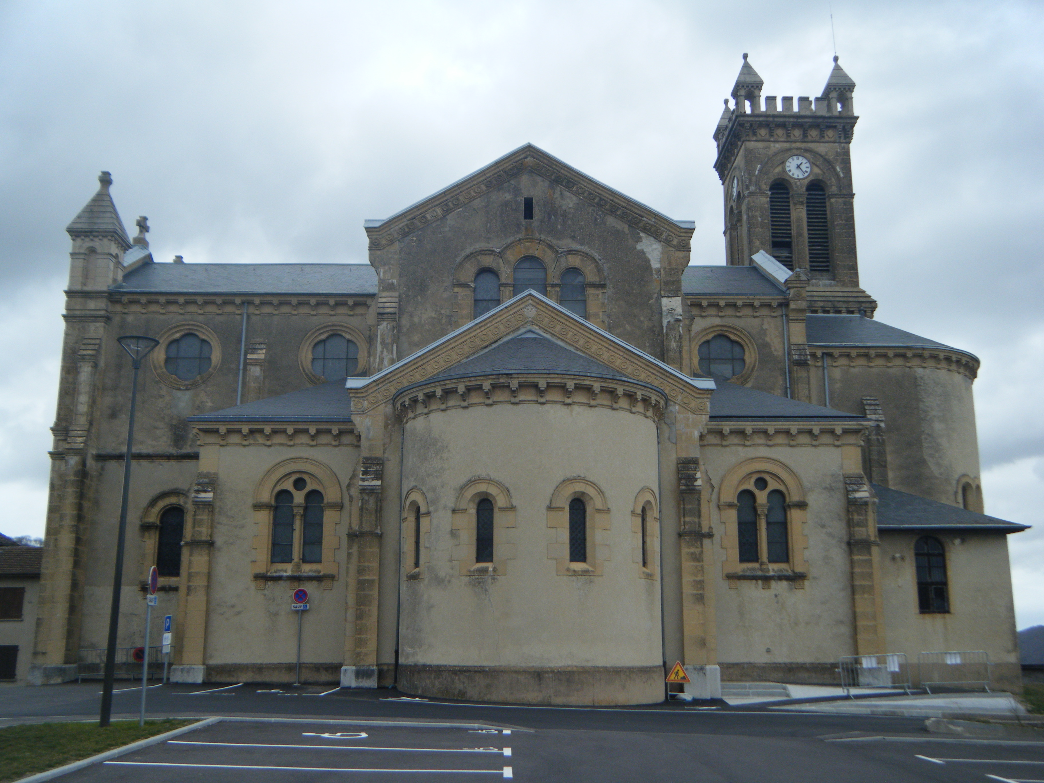 Église de Châbons en mars 2019